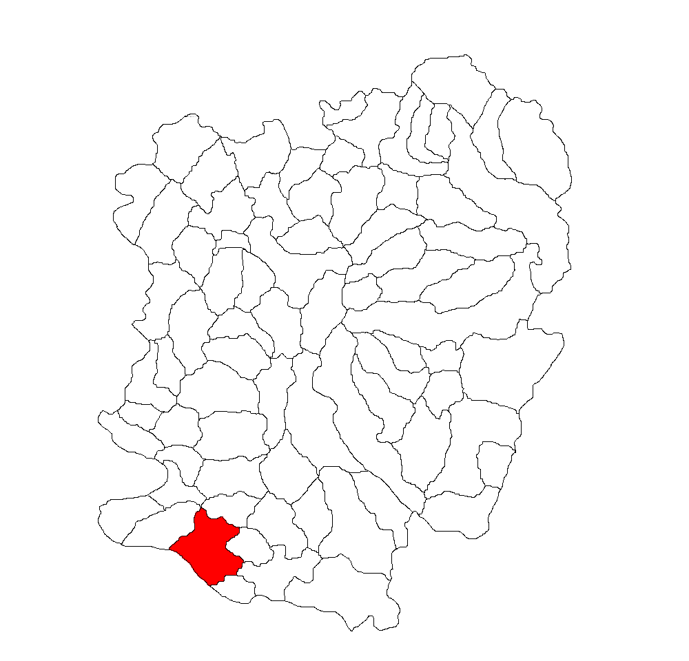 Categorie:Hărţi ale judeţului Caraş-Severin